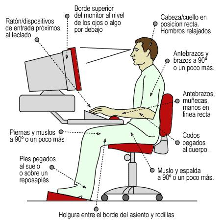 Imagen de colocación en el puesto de trabsajo,para no sufrir lesiones.